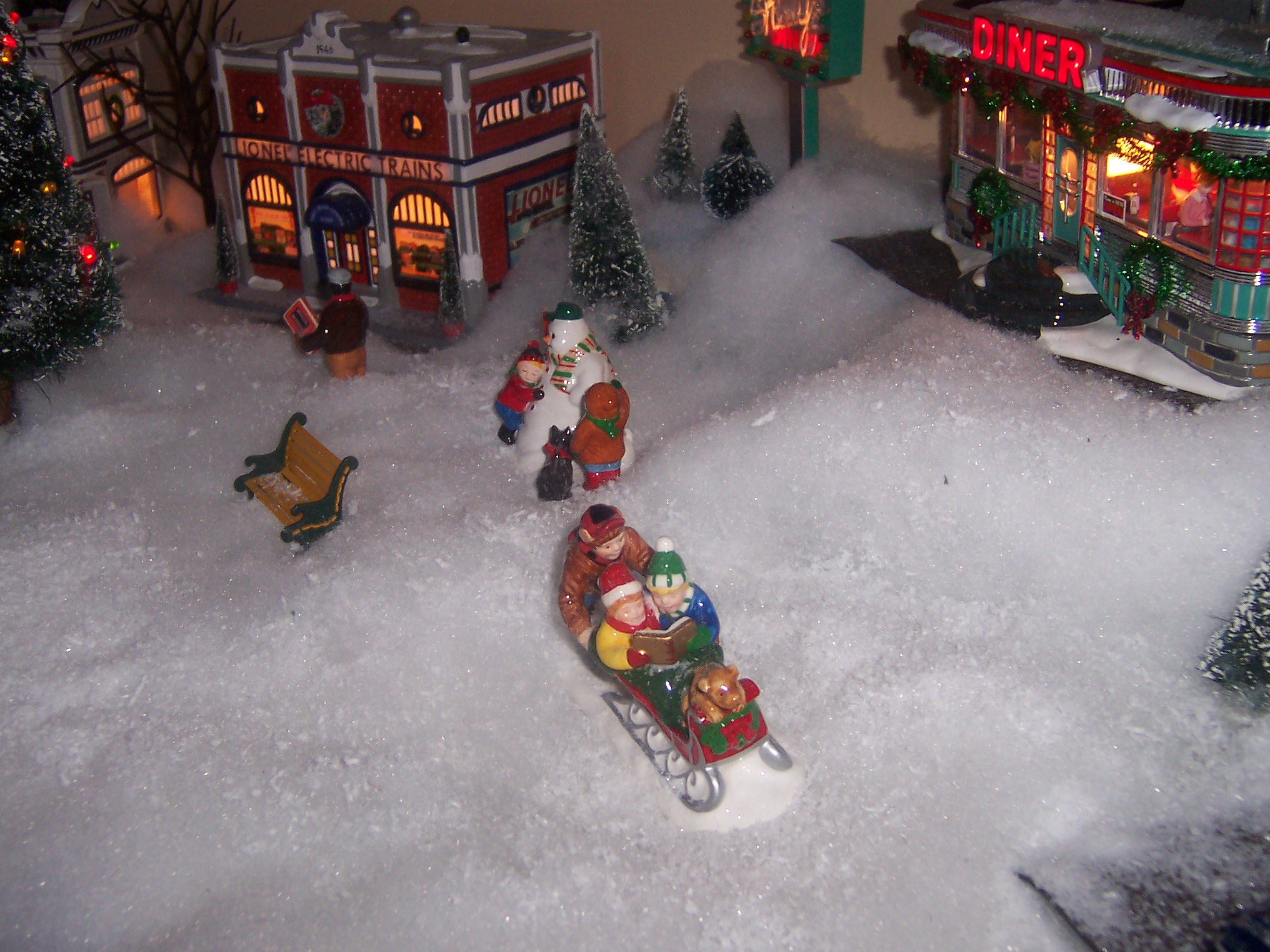 Julelandskap med snø.